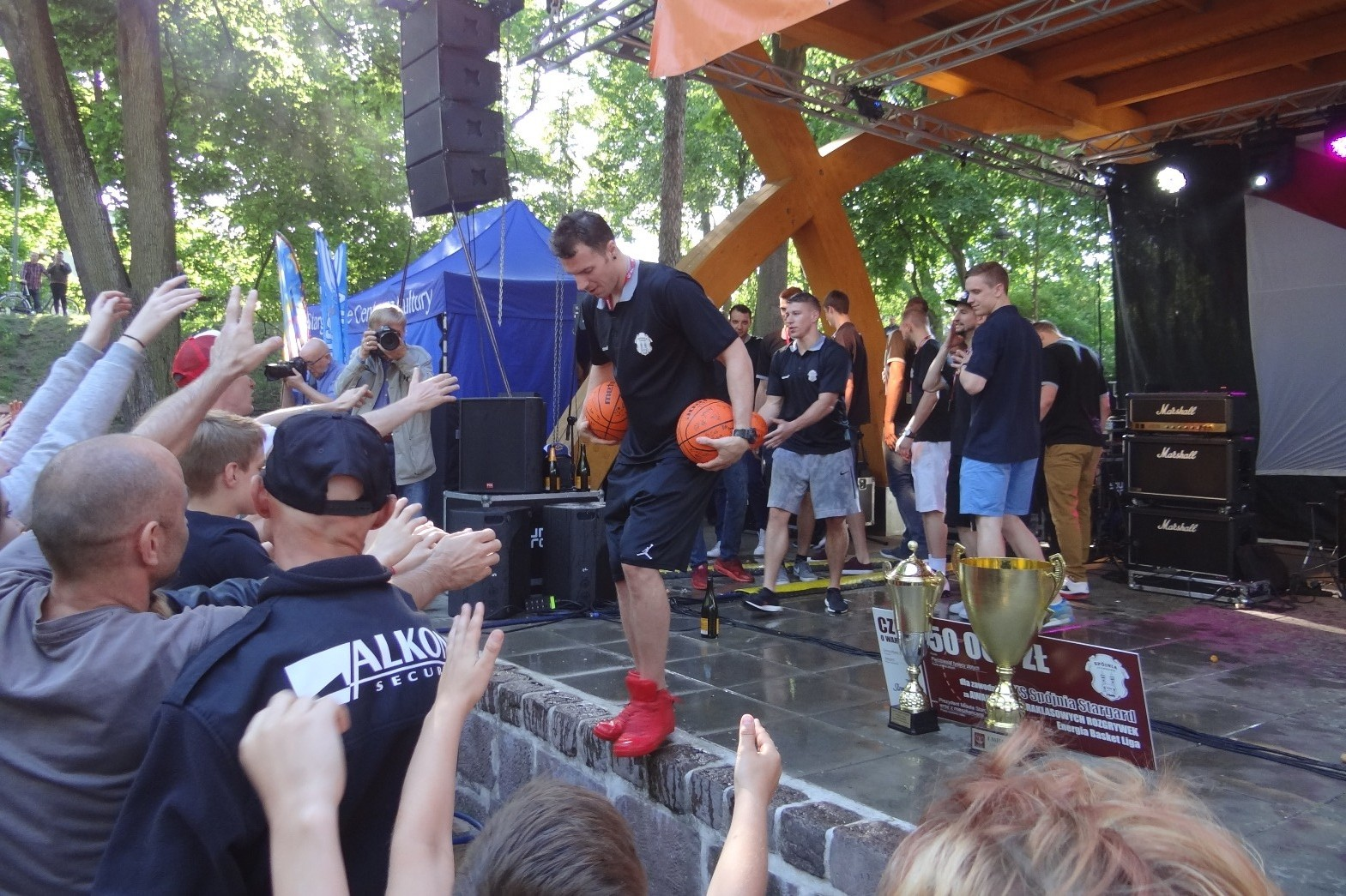 Alan Czujkowski podczas koszykarskiej fety (19.05.2018)